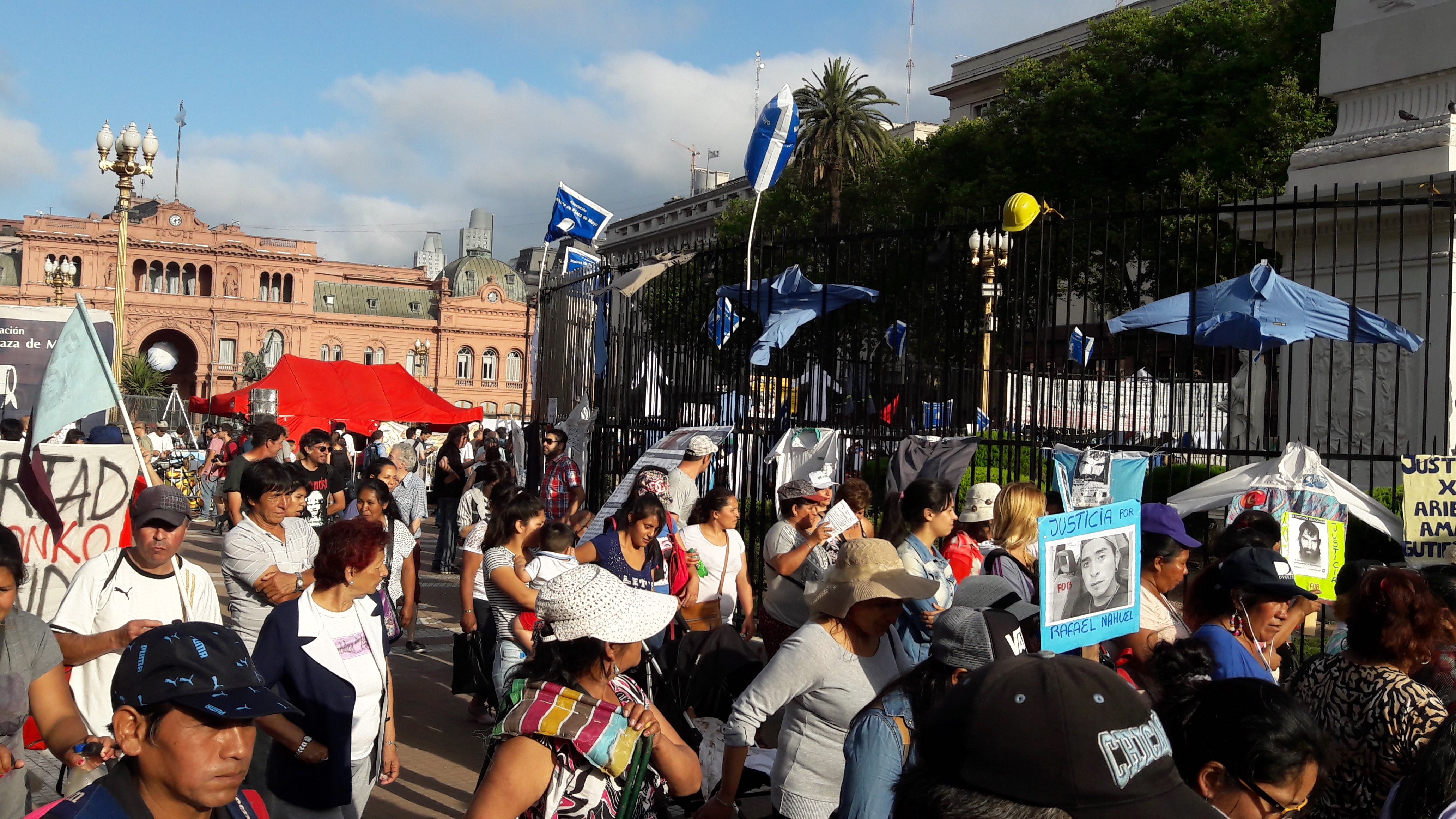 Marcha de la Resistencia 2017, Plaza de Mayo, Buenos Aires, Argentina.